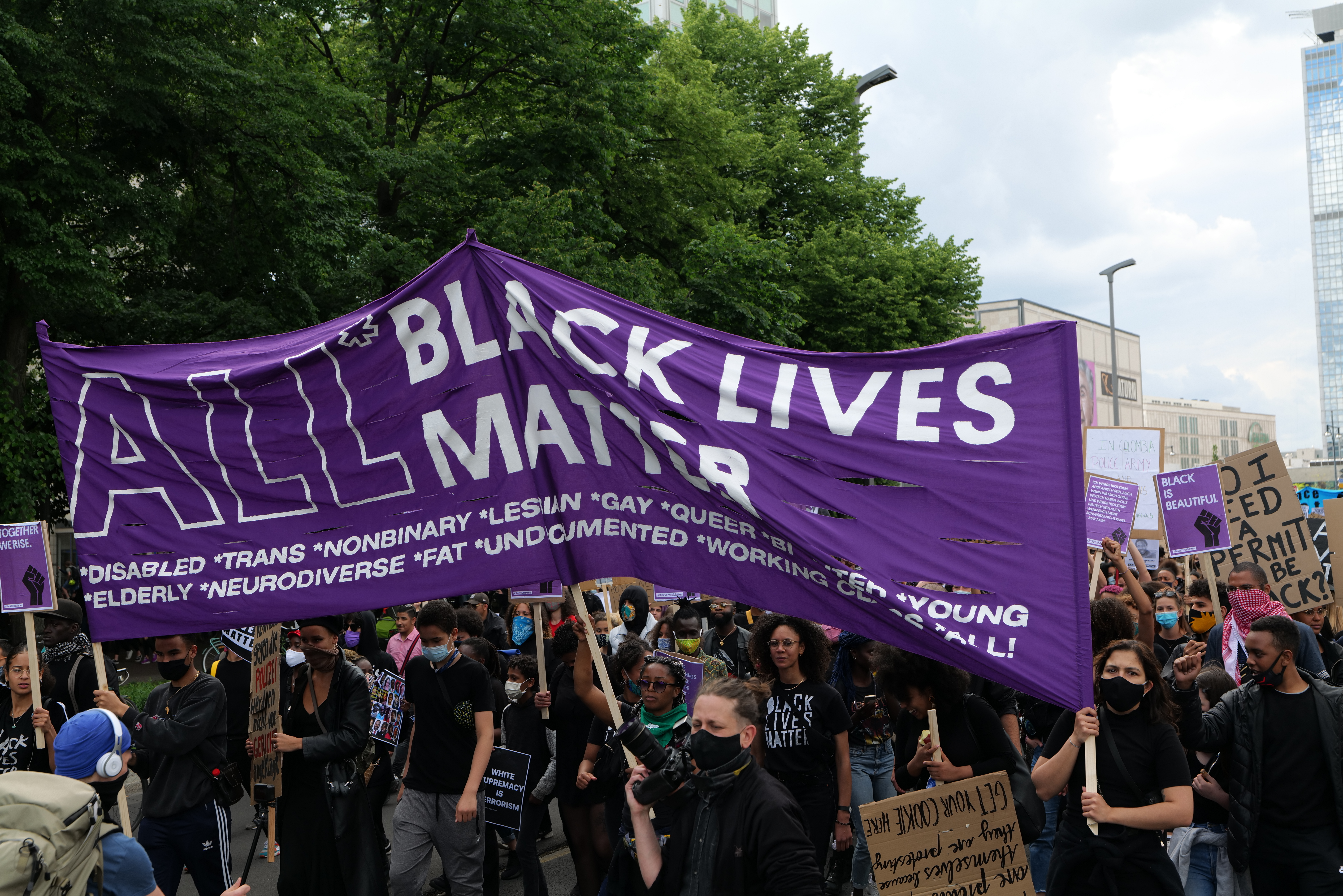 BlackLivesMatter Demonstrationszug vom Alexanderplatz zur Strausberger Platz in Berlin am 6. Juni 2020.